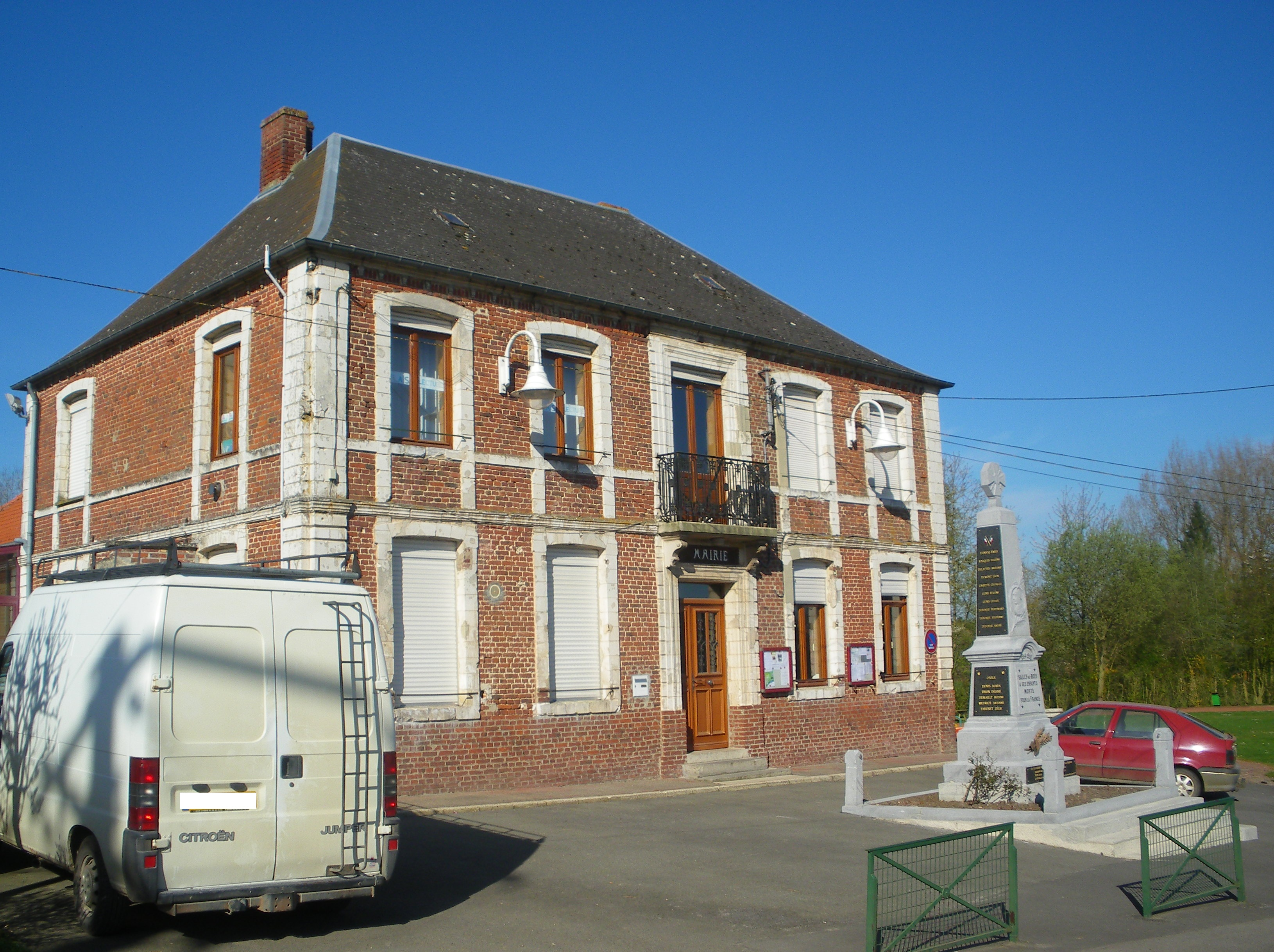 Vue de la mairie et du monument aux morts de Sailly-au-Bois.